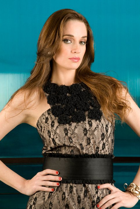 Miss Peru 1998, Entre las 10 finalistas en Miss Mundo del mismo año